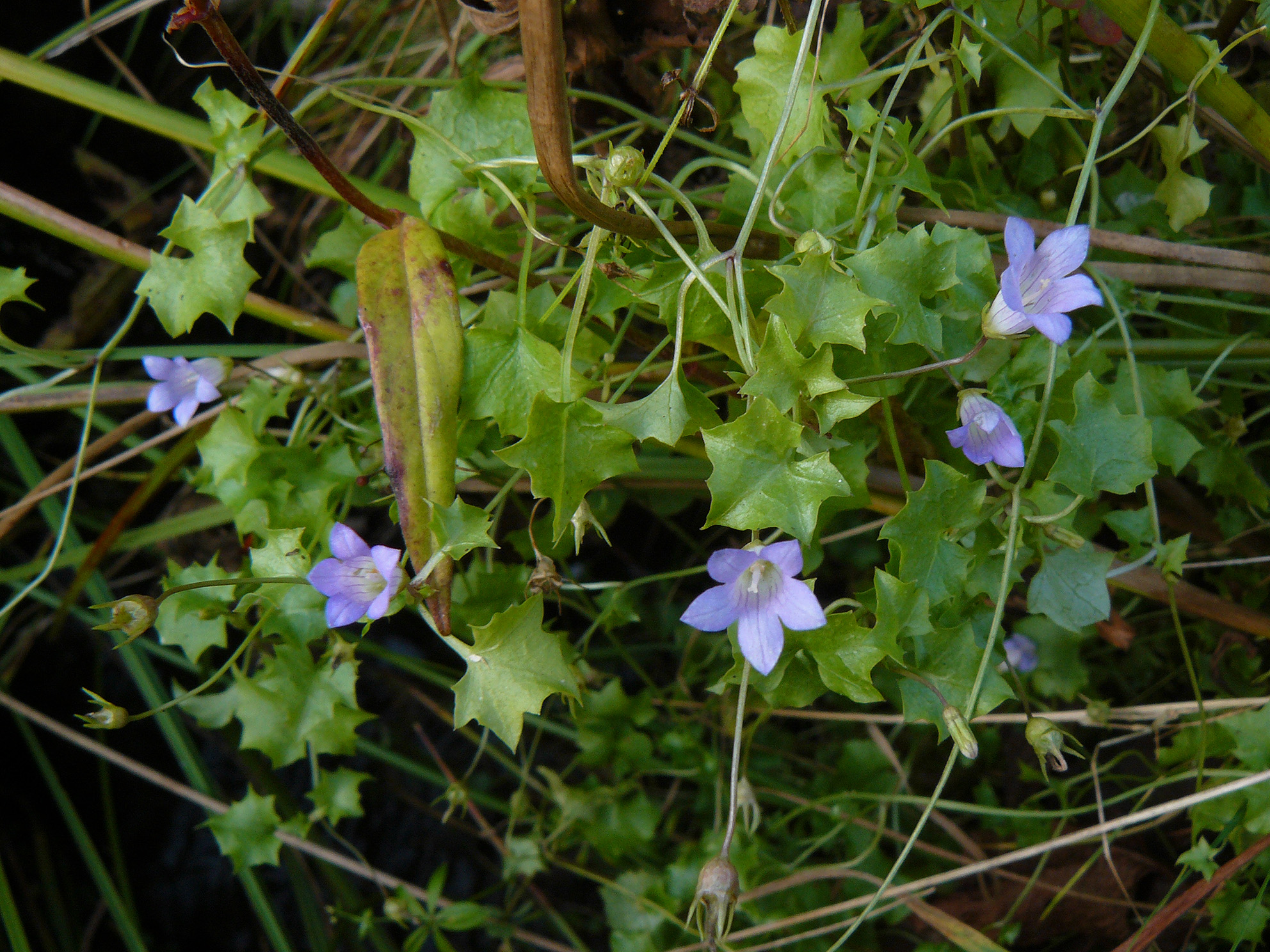 Efeu-Moorglöckchen (Wahlenbergia hederacea) im Holzwarchetal bei Mürringen, Ostbelgien; FFH-Gebiet „Vallée de la Holzwarche“. Das kleinwüchsige Efeu-Moorglöckchen wächst bevorzugt auf torfigen, sauren Sumpfwiesen, sowie am Rand kleiner Fliessgewässer. Die regenreichen Lagen der östlichen Hochardennen bilden den Ostrand der Verbreitung dieser atlantisch geprägten Art.